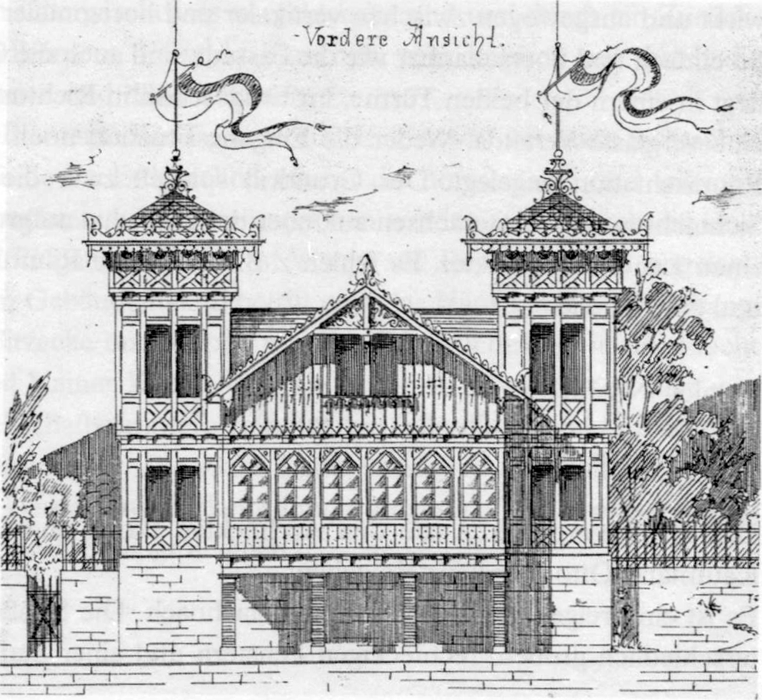 ehemalige Villa Löw, Stuttgart, Bopserwaldstraße 52, Architekt: Johann Wendelin Braunwald, 1874, Abbruch um 1922.